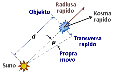 Propra movo de kosma objekto